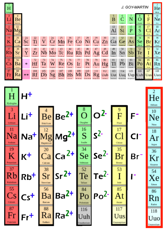 Periodic table with ion, Tableau périodique avec ion